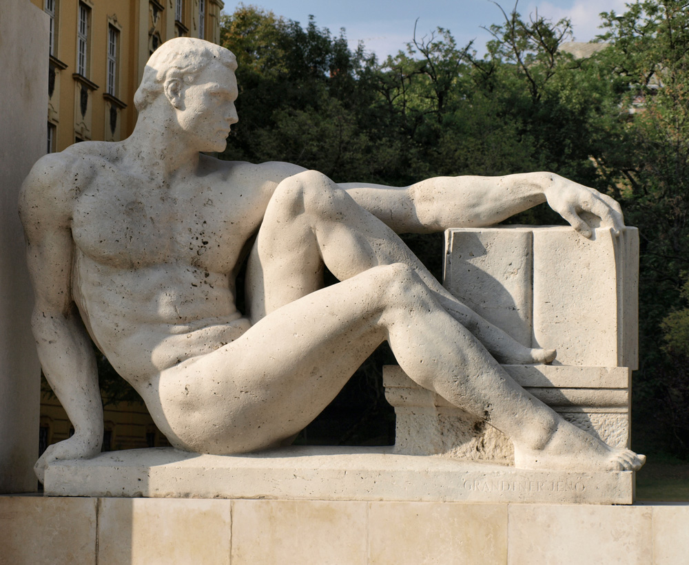 Klebelsberg Kunó szoborcsoport, férfialak (Budapest, XI. ker. Villányi út 25. – a templom és a gimnázium között)